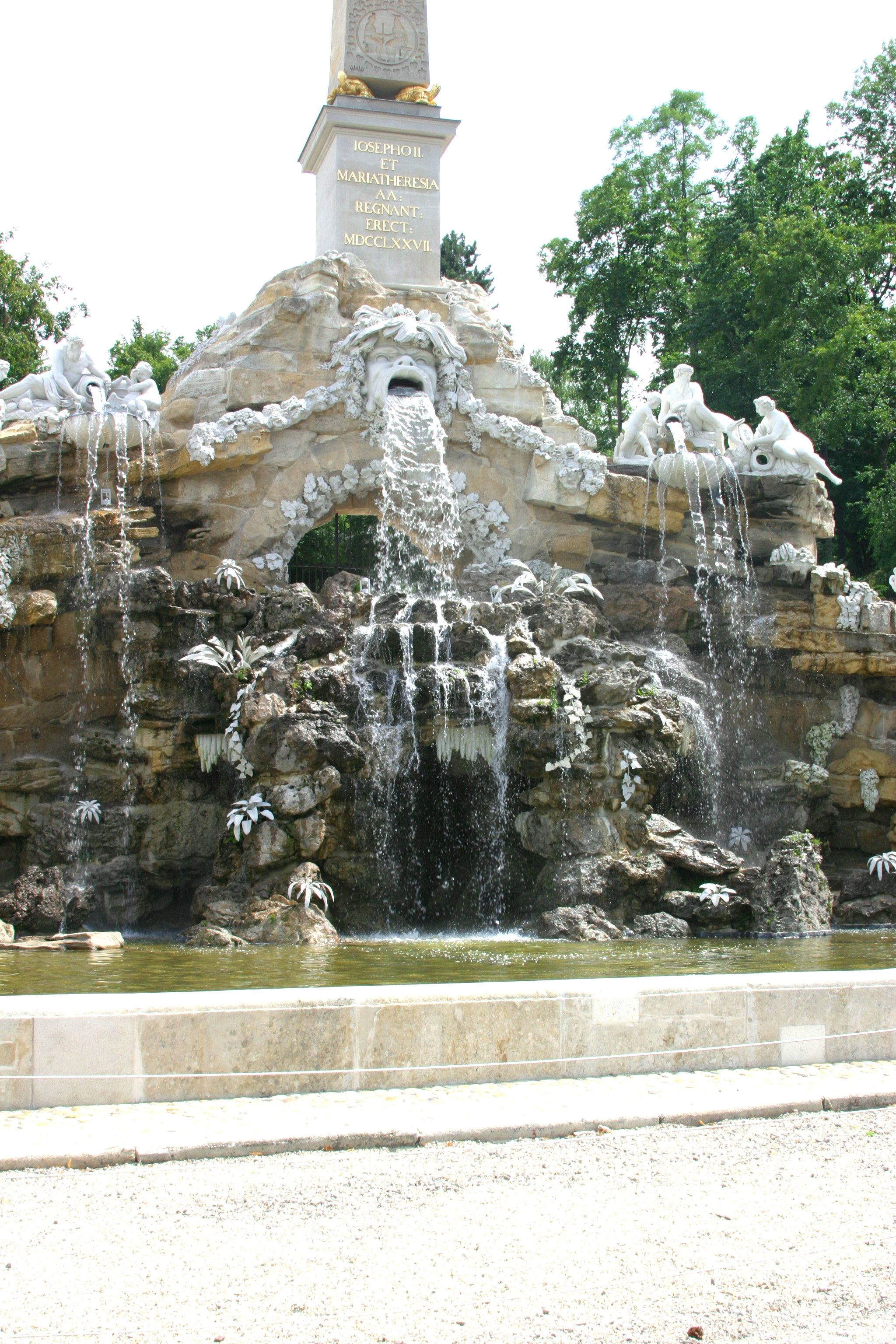 Obelisk Brunnen Detail